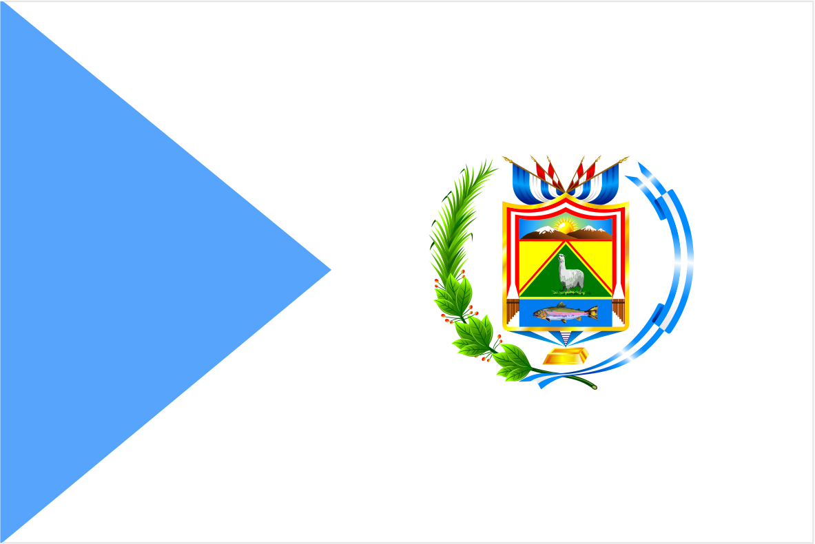 Distrito de Santa Lucía - Provincia de Lampa - Región puno